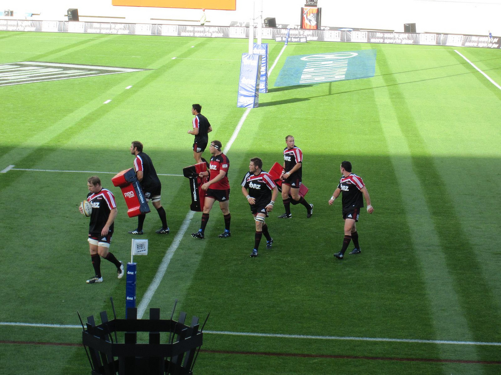 Le meilleur joueur du monde, Richie McCaw, au milieu avec un bandeau sur le haut du genou. Avec l'équipe de la franchise des Crusaders.